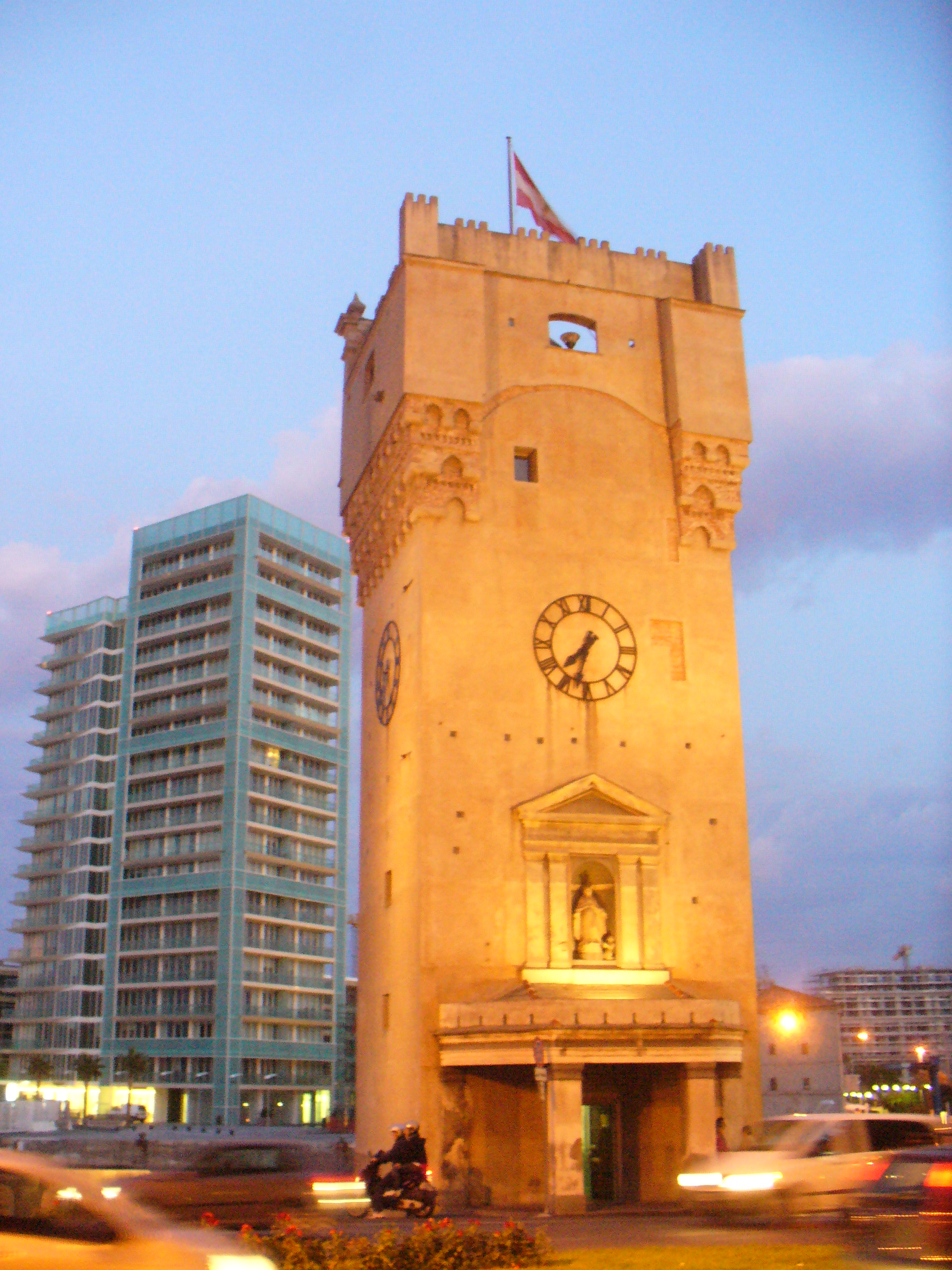 La Torre Leon Pancaldo (già della Quarda) o più comunemente chiamata Torretta, simbolo cittadino, e una torre di avvistamento rimasta delle antiche mura difensorie all'ingresso del potro, anticamente la torre era alta il doppio, ma dopo le guerre cinquecentesche contro i Genovesi la torre venne ridotta all'altezza attuale (vi e la proposta (forse provocatoria)di riportarla all' altezza originaria proprio come la vicina torre del Brandale che fù abbassata nelle guerre e rialzata nel 1931), Savona - Provincia di Savona / Liguria (Italy)